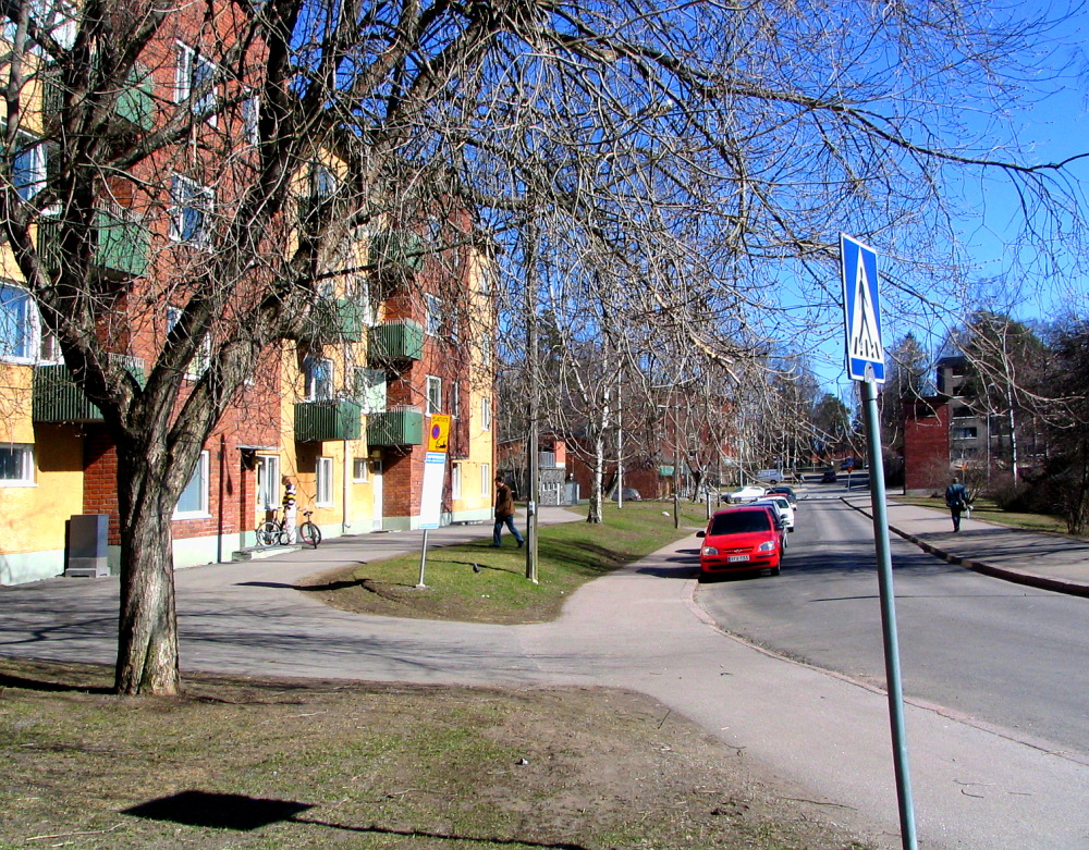 Tuhkimontie at Roihuvuori